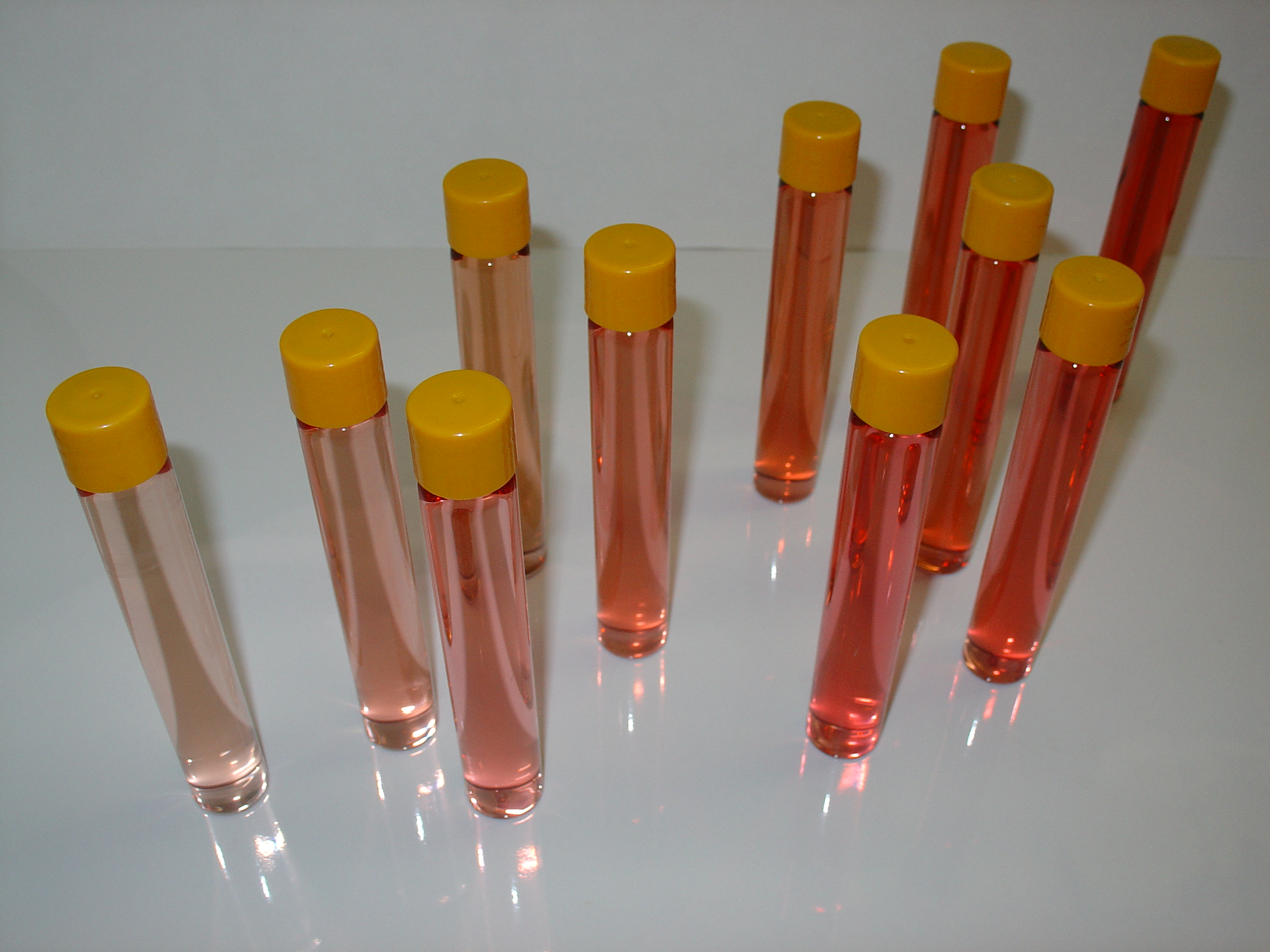 Description : gamme de couleur de vins rosés de Provence Source : image personnelle - Novembre 2005